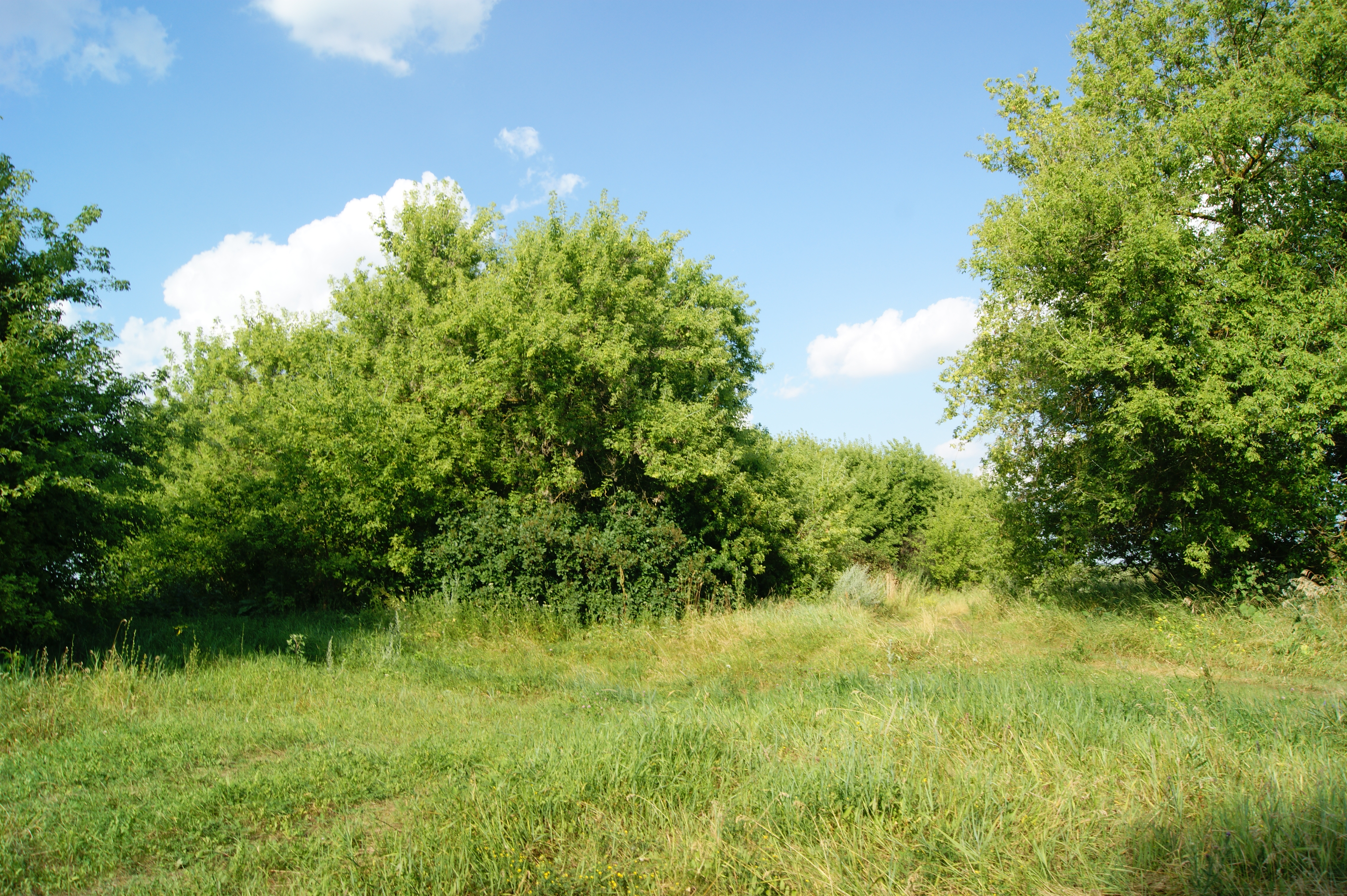 Усадьба Филлипова/The remains of the park in the farmstead of Filippov near the village of Alekseyevka, Dobrinsky district, Lipetsk region